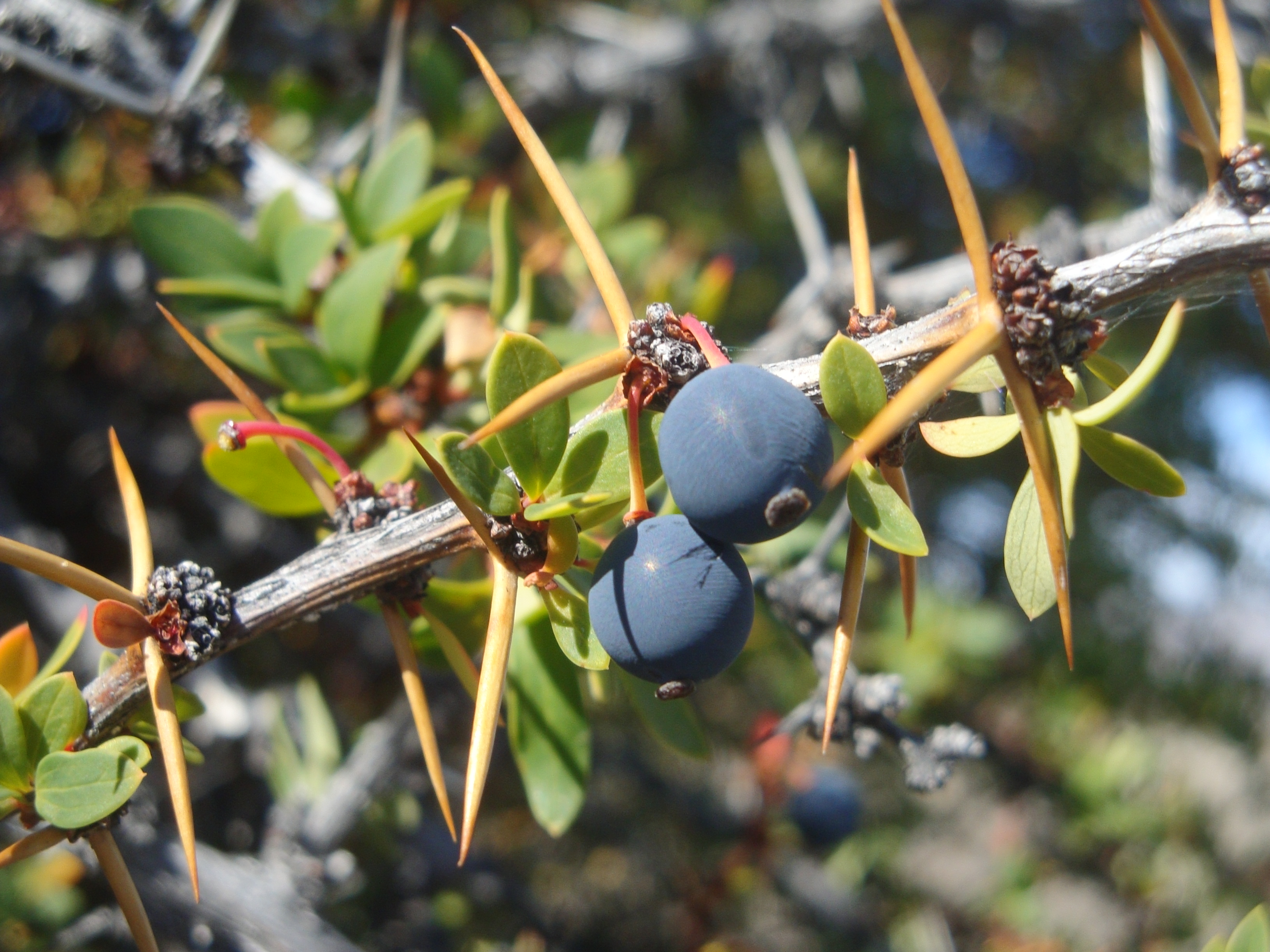 Fruto de Berberis microphylla, conocido como Calafate.